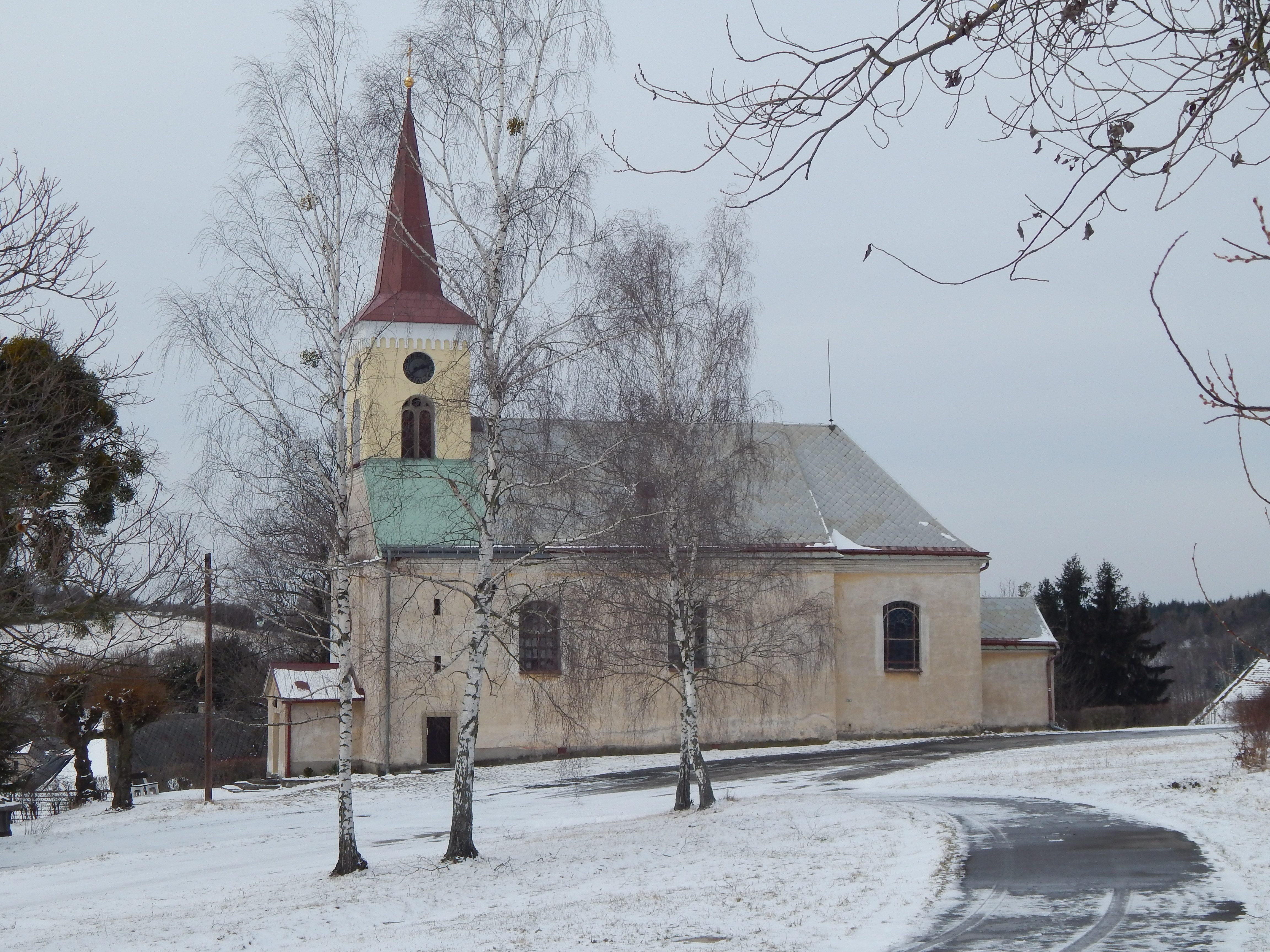 Nová fotografie kostela